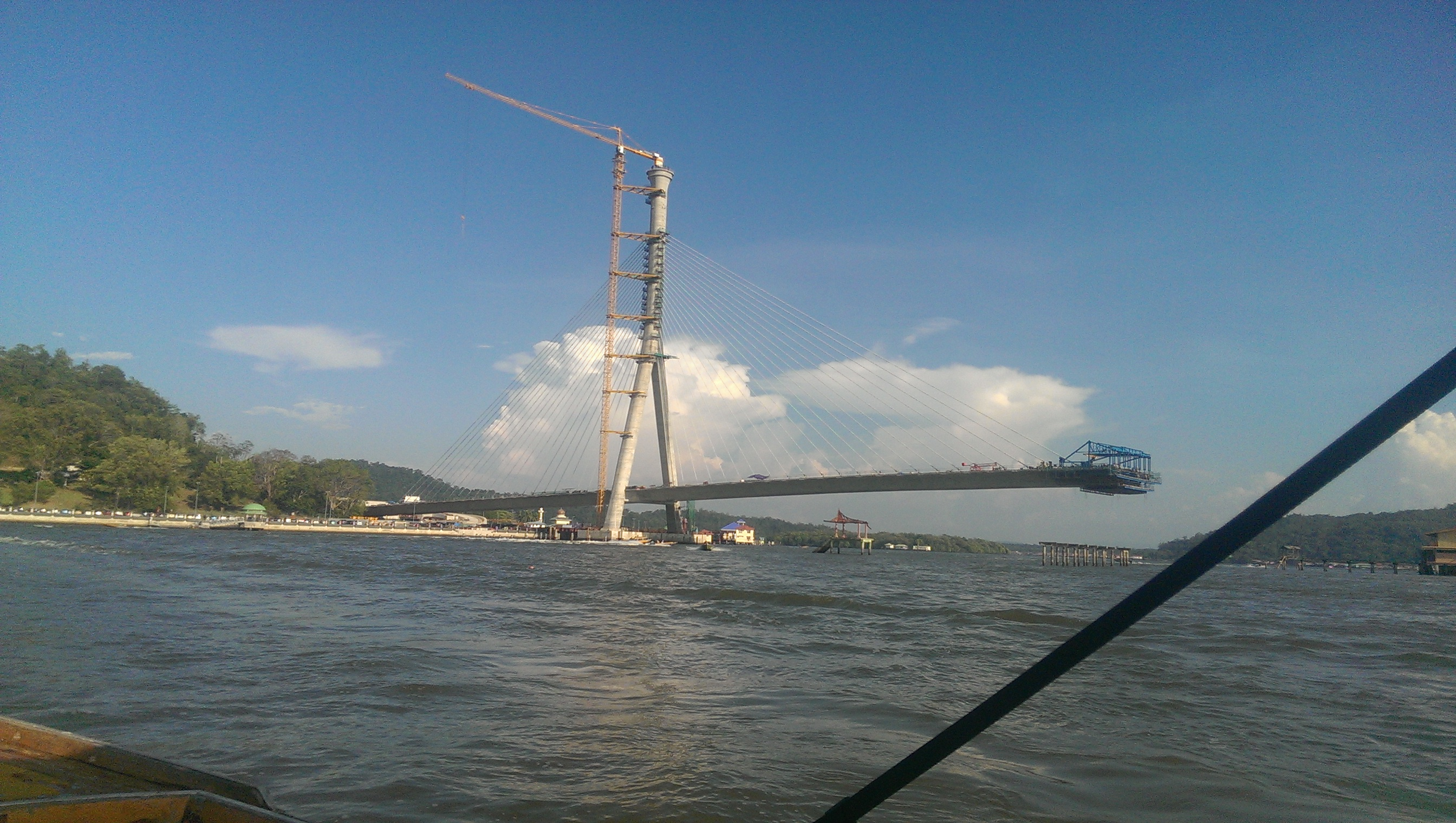 Contruction of street bridge in Brunei in 2016